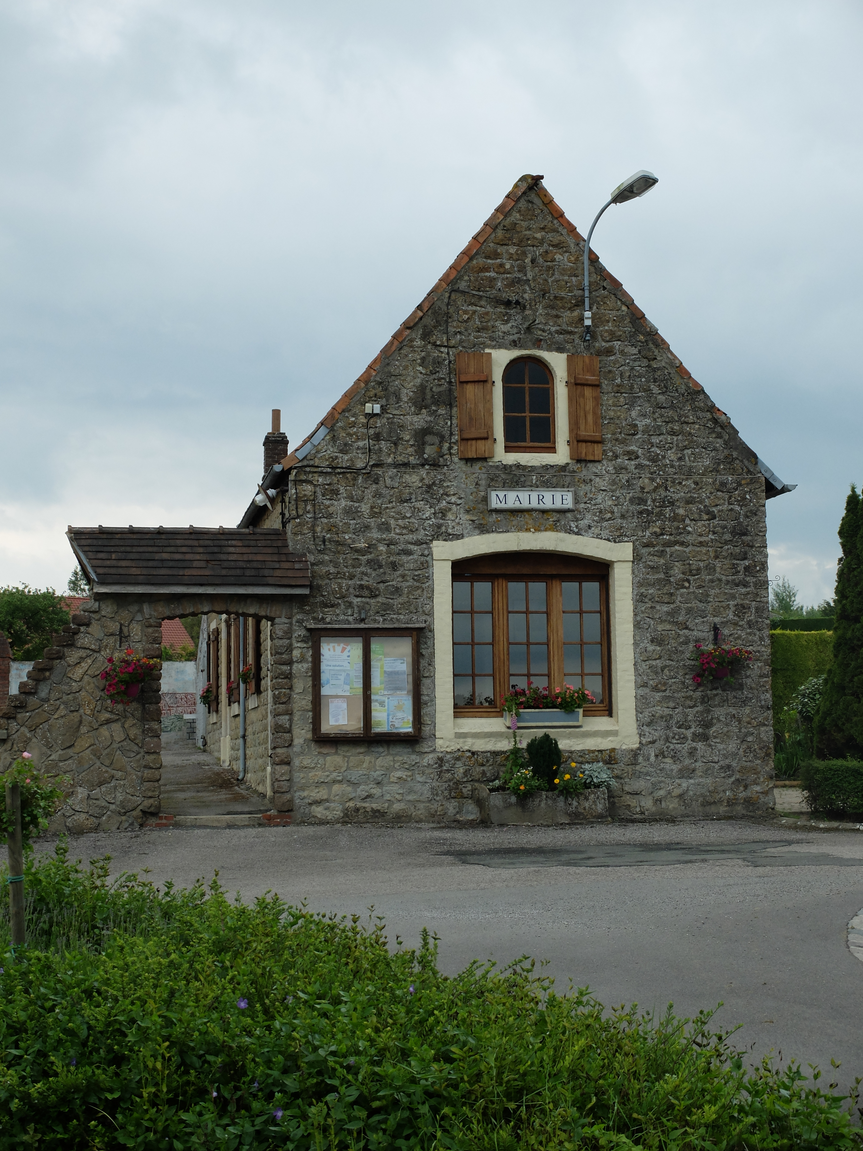 Vue de la mairie de Bellebrune.